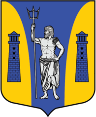 Герб МО Высоцкое городское поселение